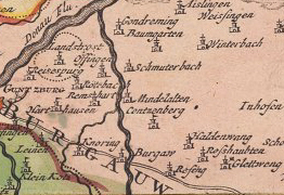 Ausschnitt aus Totius S R I Circuli Suevici Tabula Chorographica